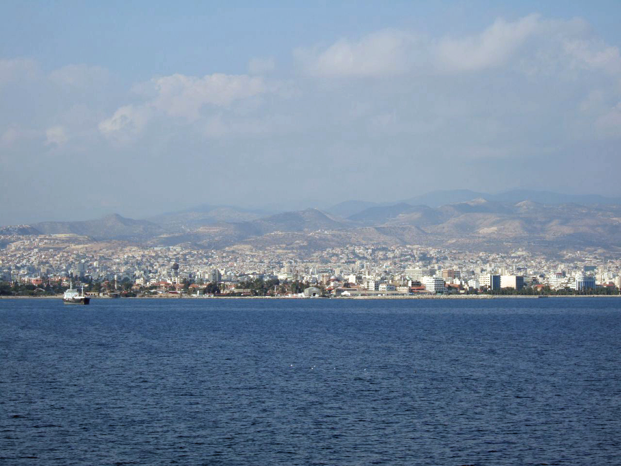 Limassol, CiproLimassol